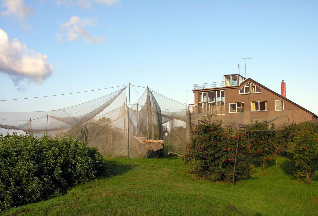 Žemaitėška: bat-smg:Vėntė, paukščiu žėidavėma stuotės